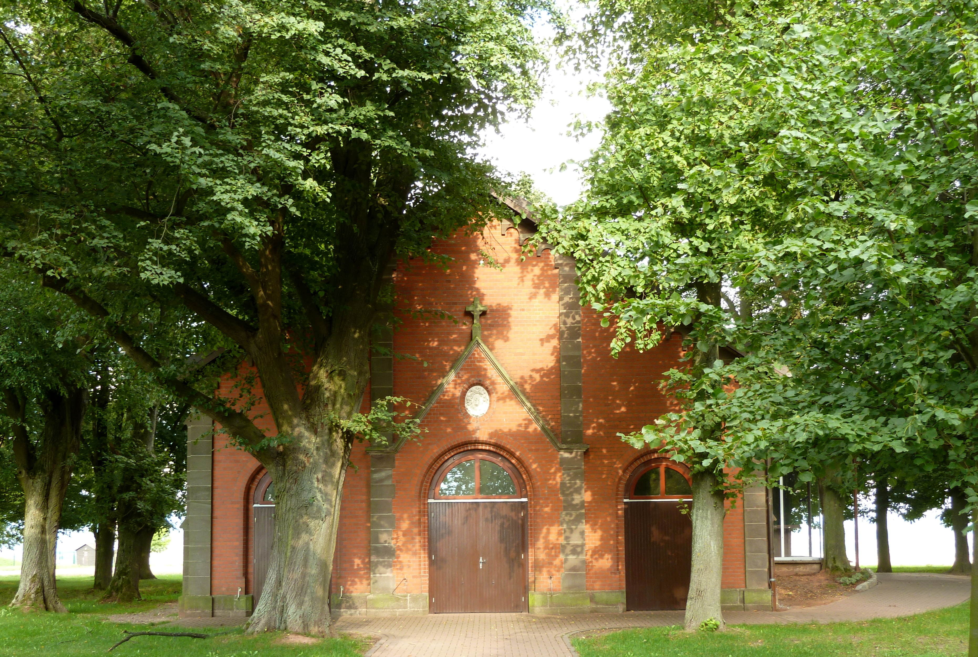 Wallfahrtskapelle zu den Vierzehn Heiligen Nothelfern auf dem Höherberg bei Wollbrandshausen, Untereichsfeld. Errichtet ursprünglich 1855, Erweiterungsbau der Kapelle 1901/01